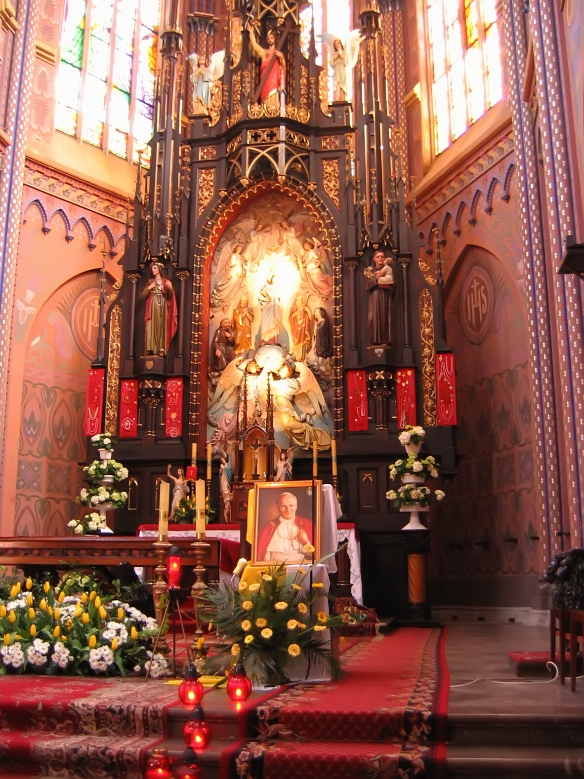 Ołtarz w Bazylice NMP w Dąbrowie Górniczej